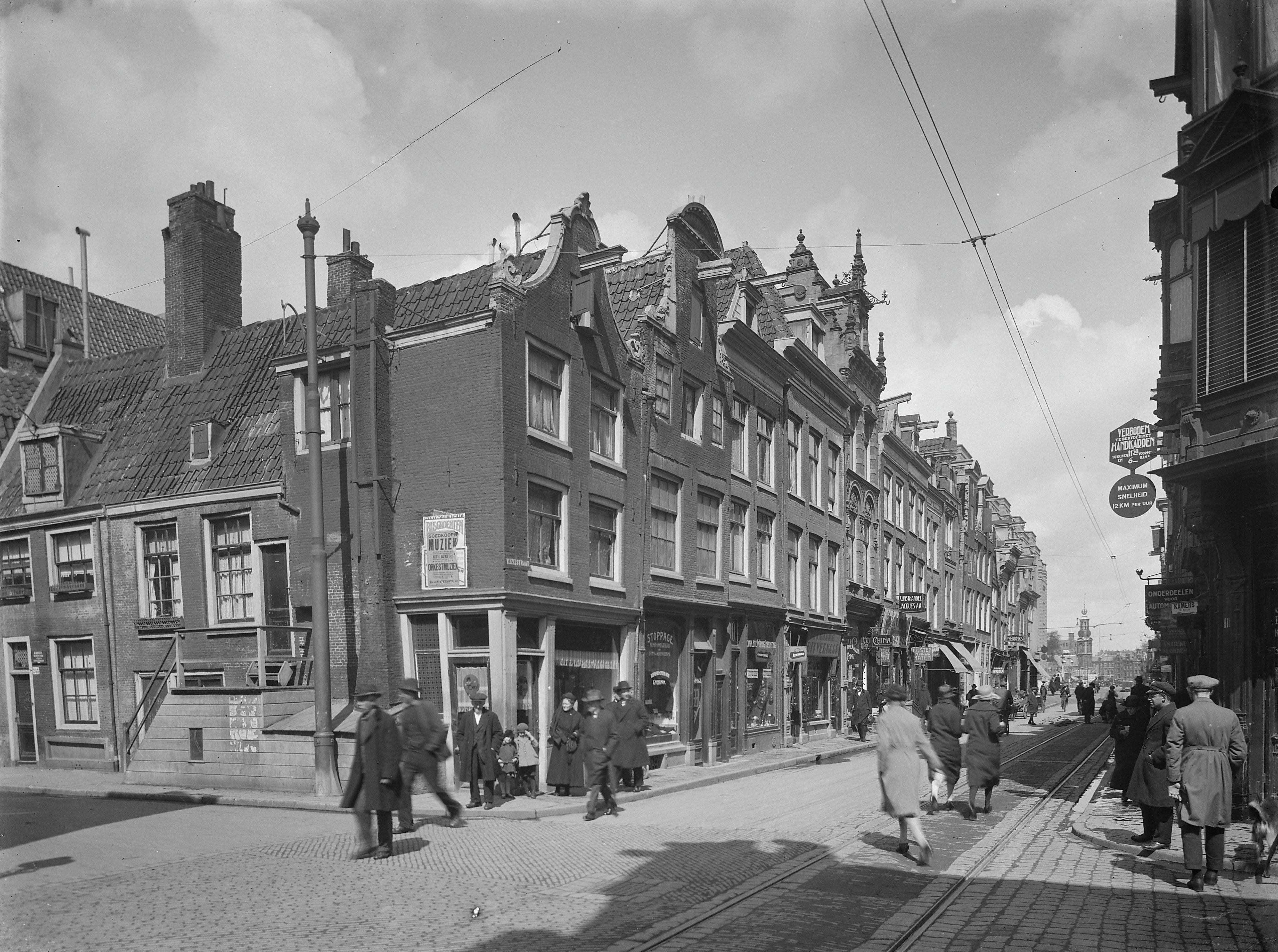 Gevelwand met straatbeeld (opmerking: In: Buiten ; 20(1926); nr. 416, p. 486)